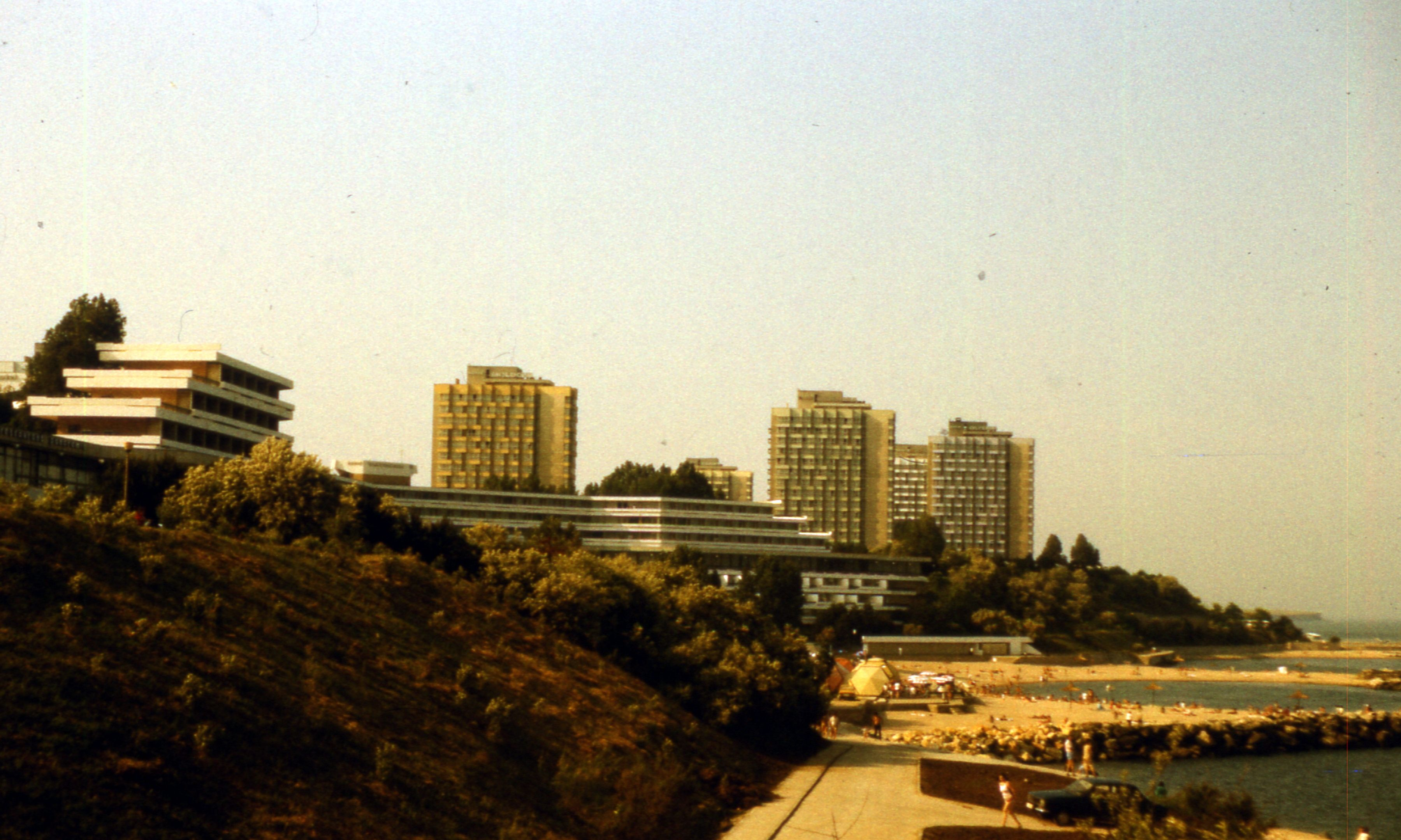 Hotels in Neptun, Romania 1988